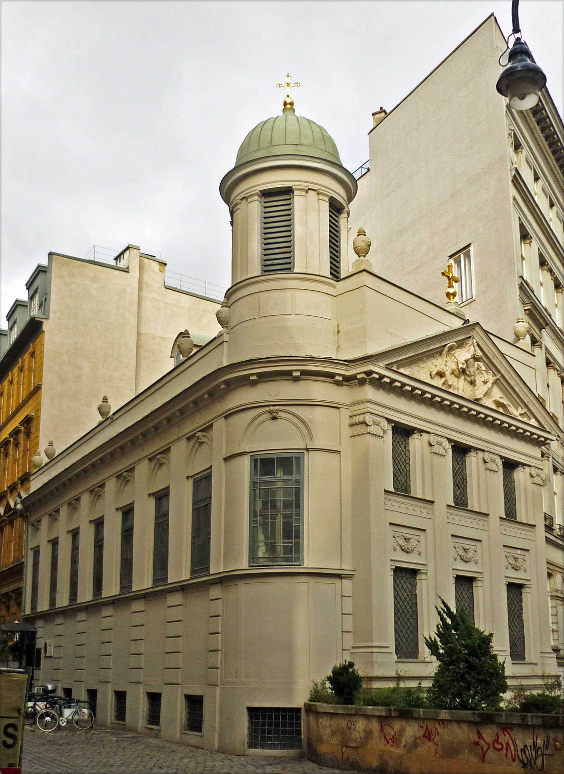 Griechisch-orientalische Kirche in Wien, Griechengasse